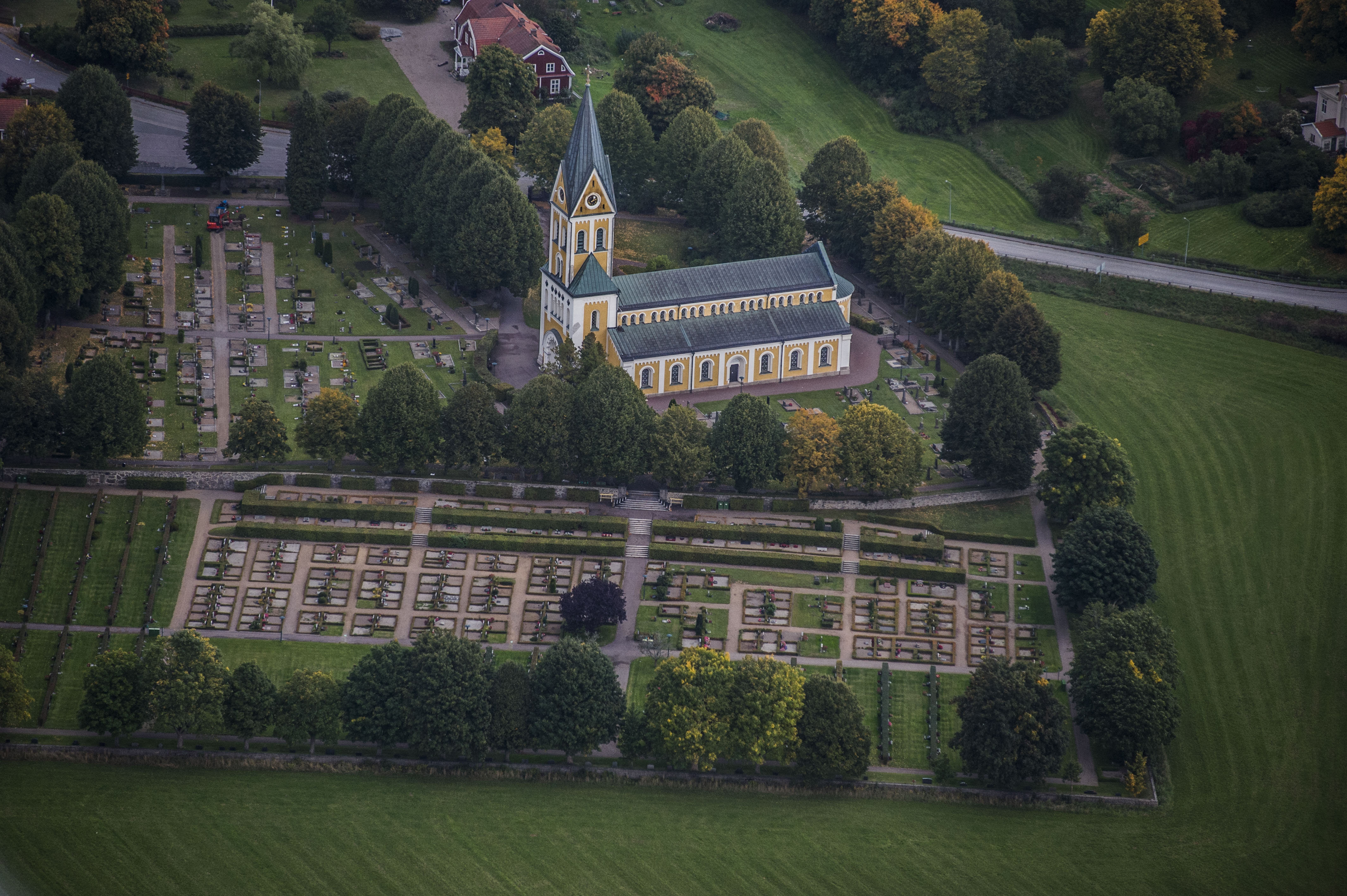 Bräkne-Hoby kyrka från luften